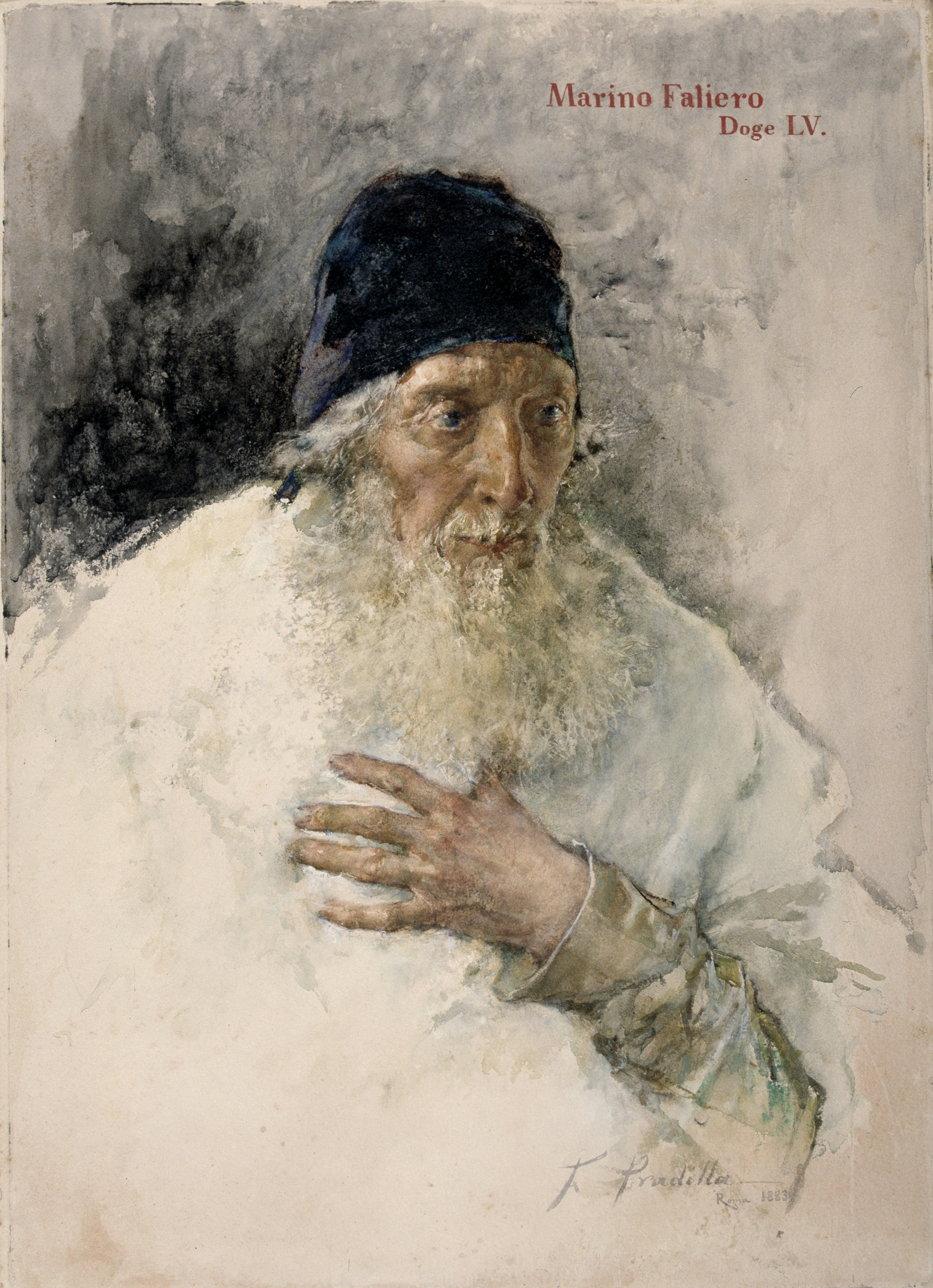 Francisco Pradilla, Marino Faliero, Dux LV, 1883, acuarela sobre papel, 725 x 515 mm. Adquirido por el Museo del Prado en 2001.